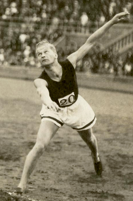 Gunnar Lindström